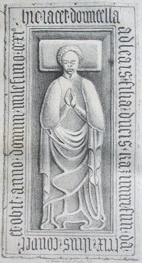 Płyta nagrobna księżnej Adelajdy